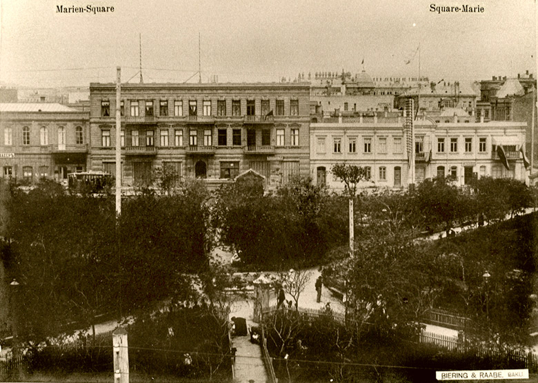 Молоканский сад